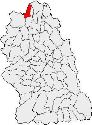 Categorie:Hărţi ale judeţului Hunedoara